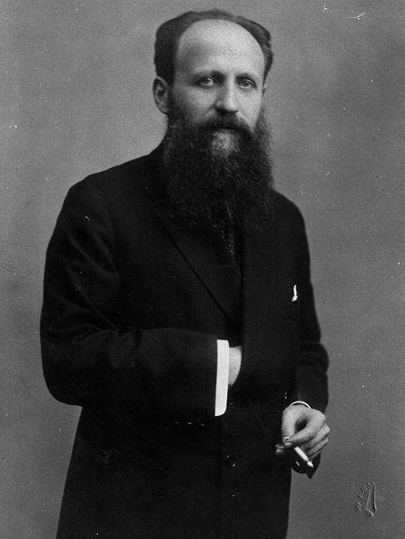 Alexandru Tzigara-Samurcaş (n. 23 aprilie 1872, Bucureşti - d. 1 aprilie 1952, Bucureşti)